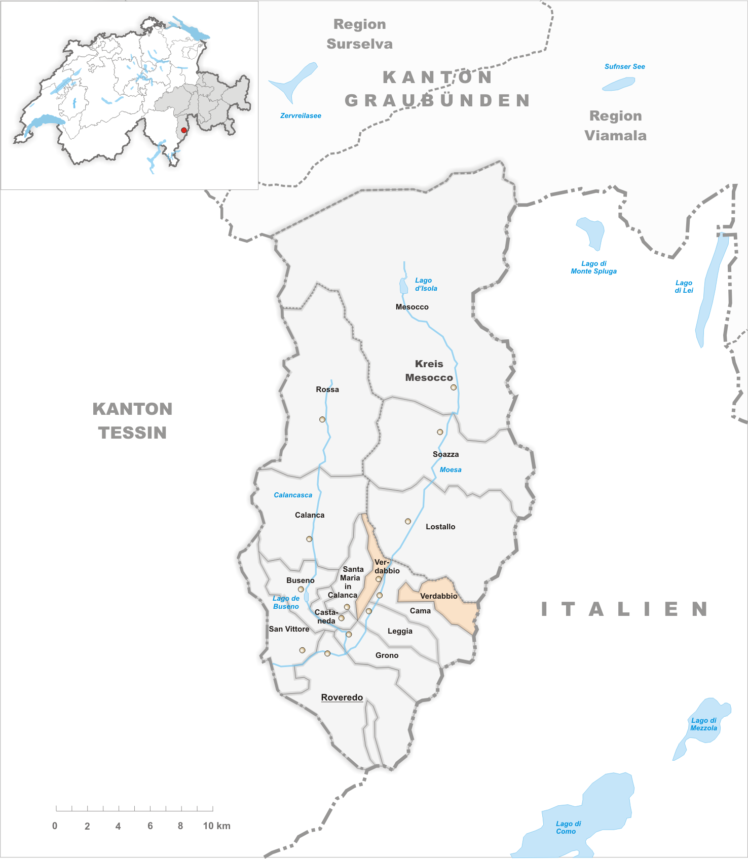 Municipality Verdabbio